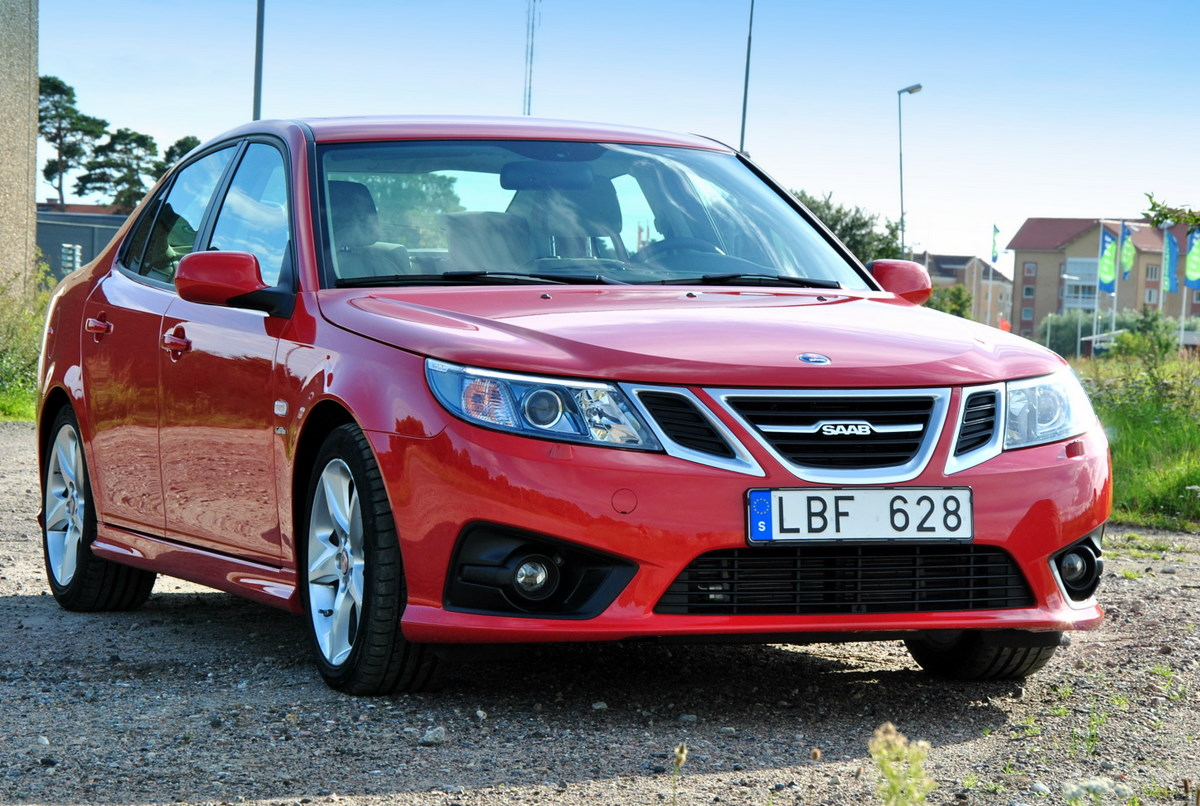 Saab 9-3 Griffin TTID 119gr (103)